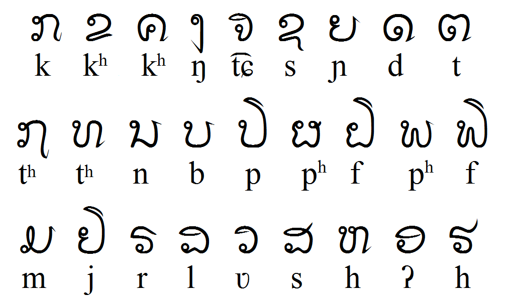 Tai Noi consonants